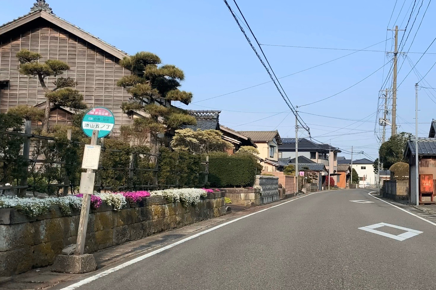 「漆山五ノ丁」バス停周辺（新潟市西蒲区，2020年4月）